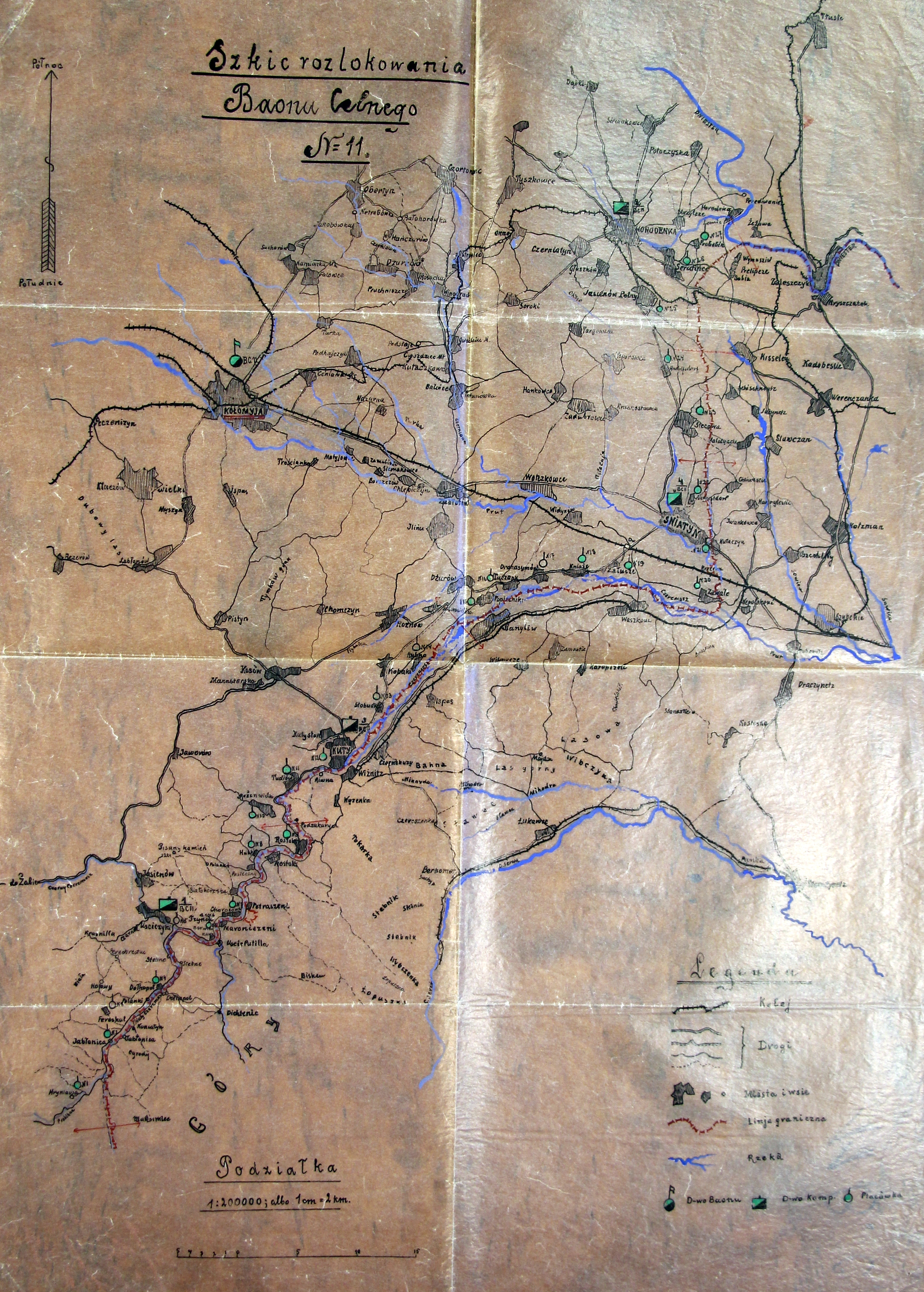 Szkic rozmieszczenia 11 batalionu celnego kołomyja